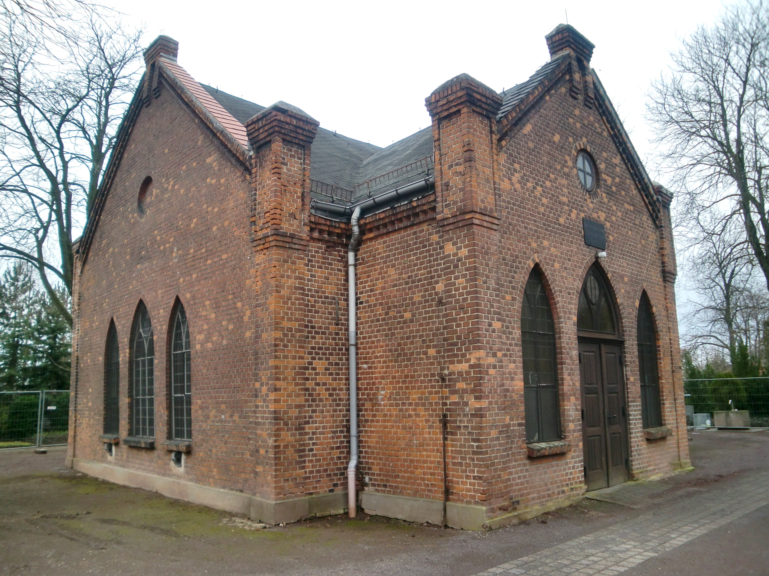 ehemalige Friedhofskapelle Salbke